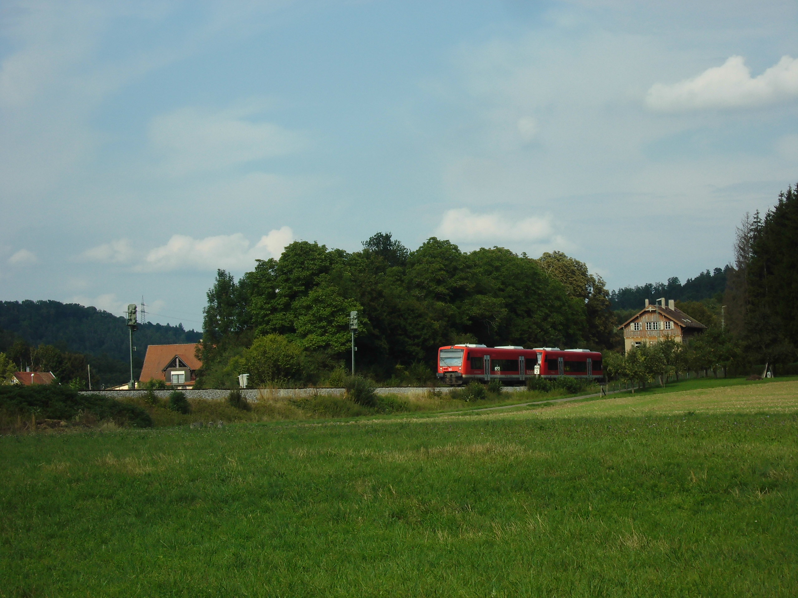 Bahnhof Bieringen von 1865 an der Bahnstrecke Tübingen–Horb mit einem Stadler Regio-Shuttle RS1 der Kulturbahn von Tübingen bis Pforzheim.